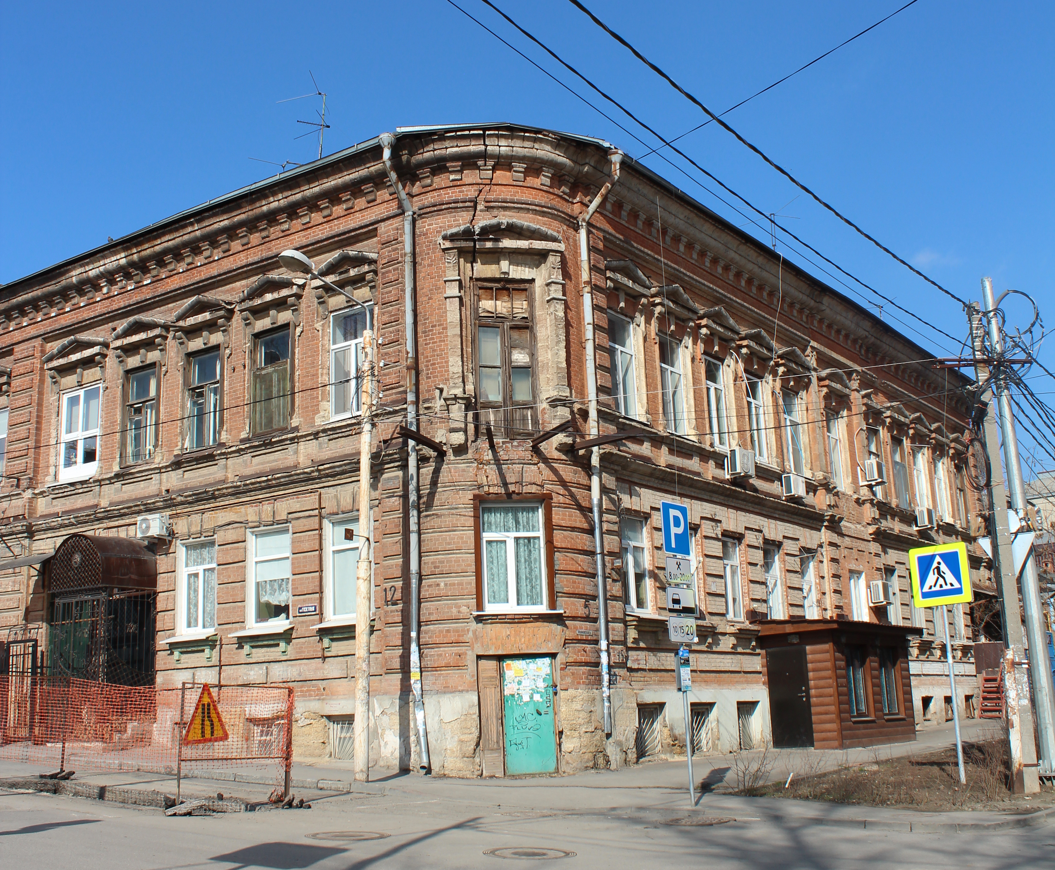 Здание города Ростова-на-Дону